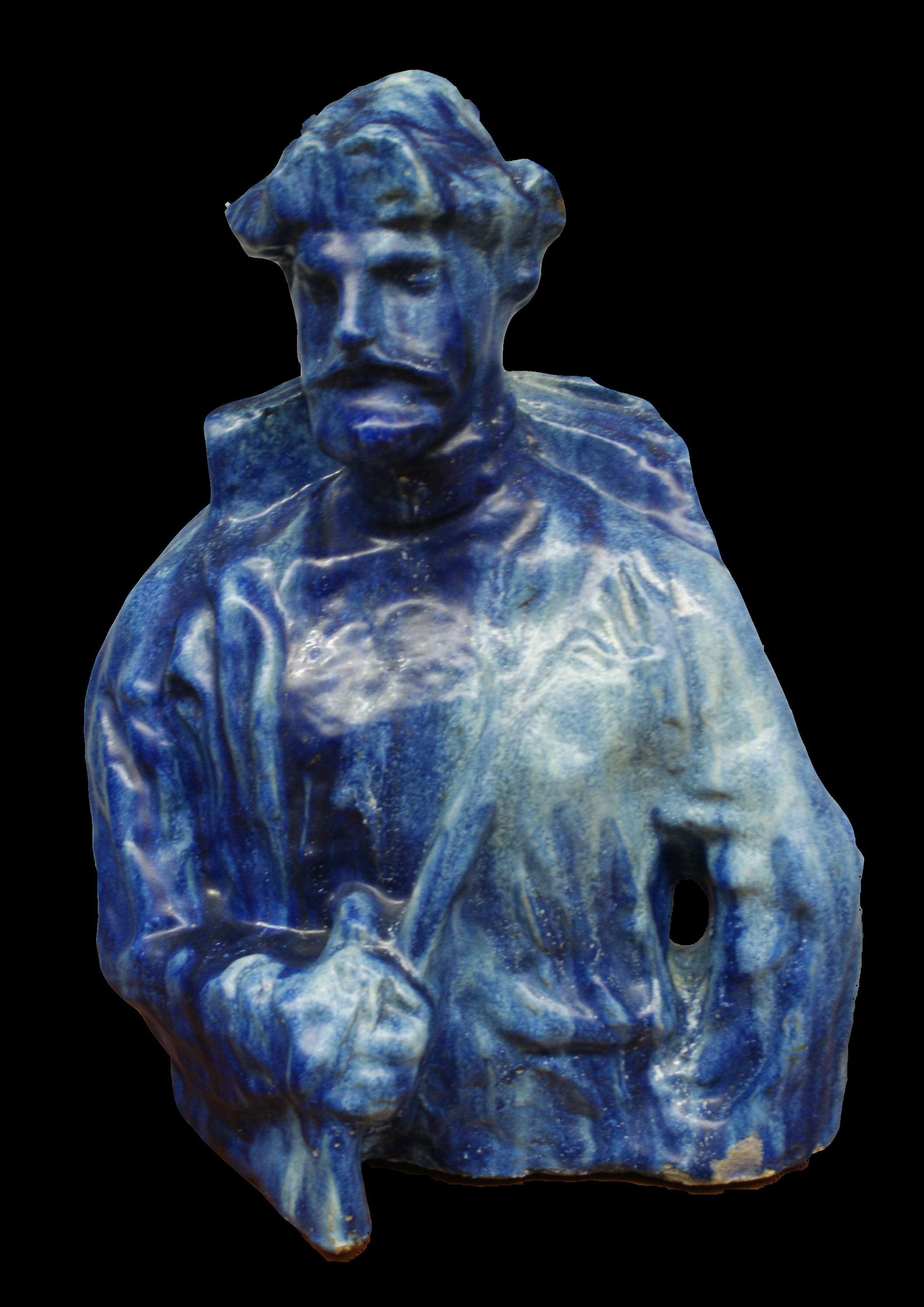 Садко. Маёліка